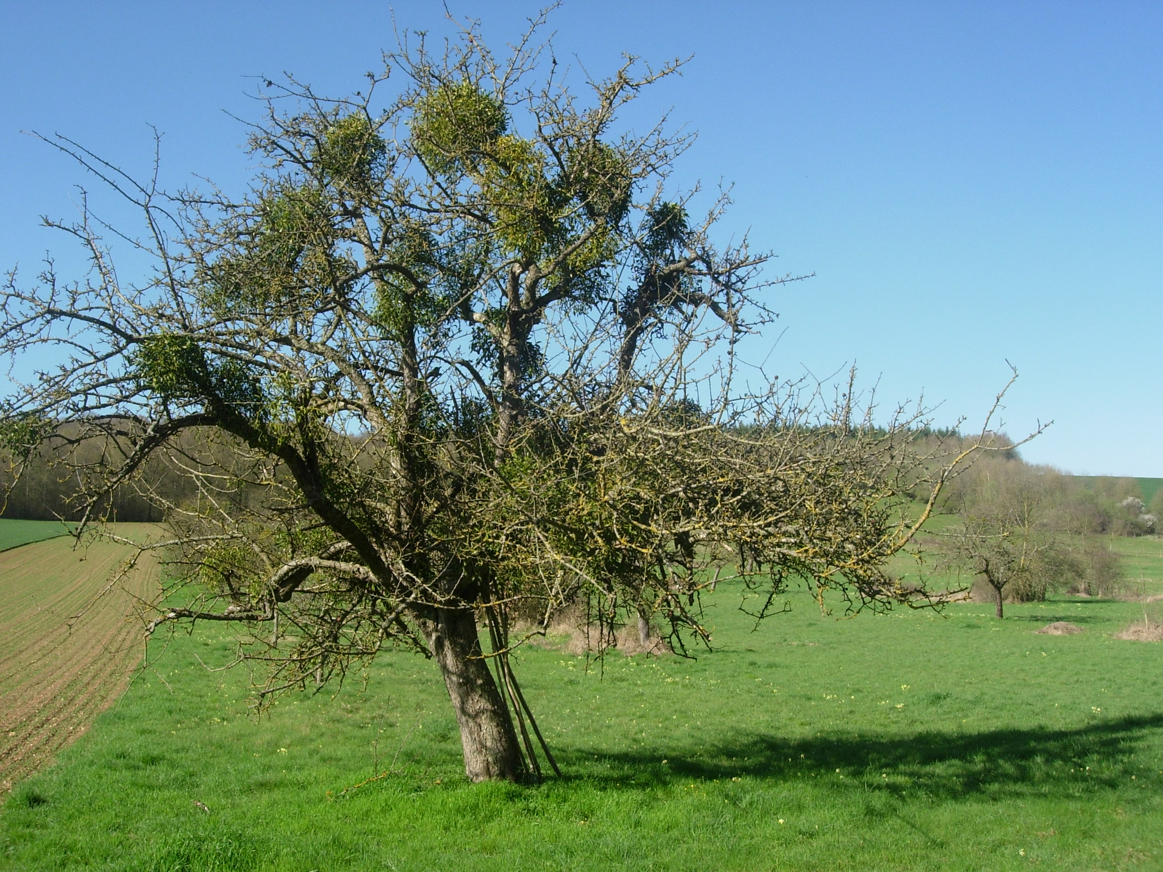 Verger à Thuisy (commune d'Estissac - Aube)